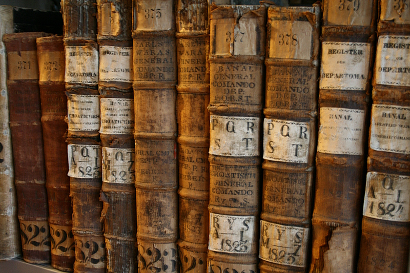 Hrvatski državni arhiv